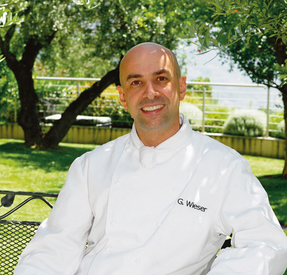 Gerhard Wieser, 2 Sternekoch im Hotel Castel/Trenkerstube